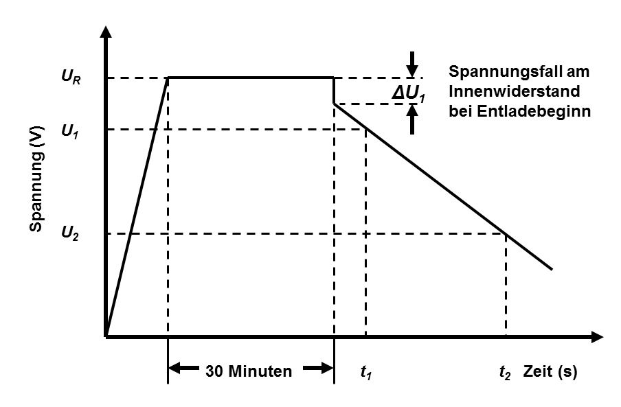 Messbedingungen zur Messung der Gleichspannungskapazität von hochkapazitiven Doppelschichtkondensatoren